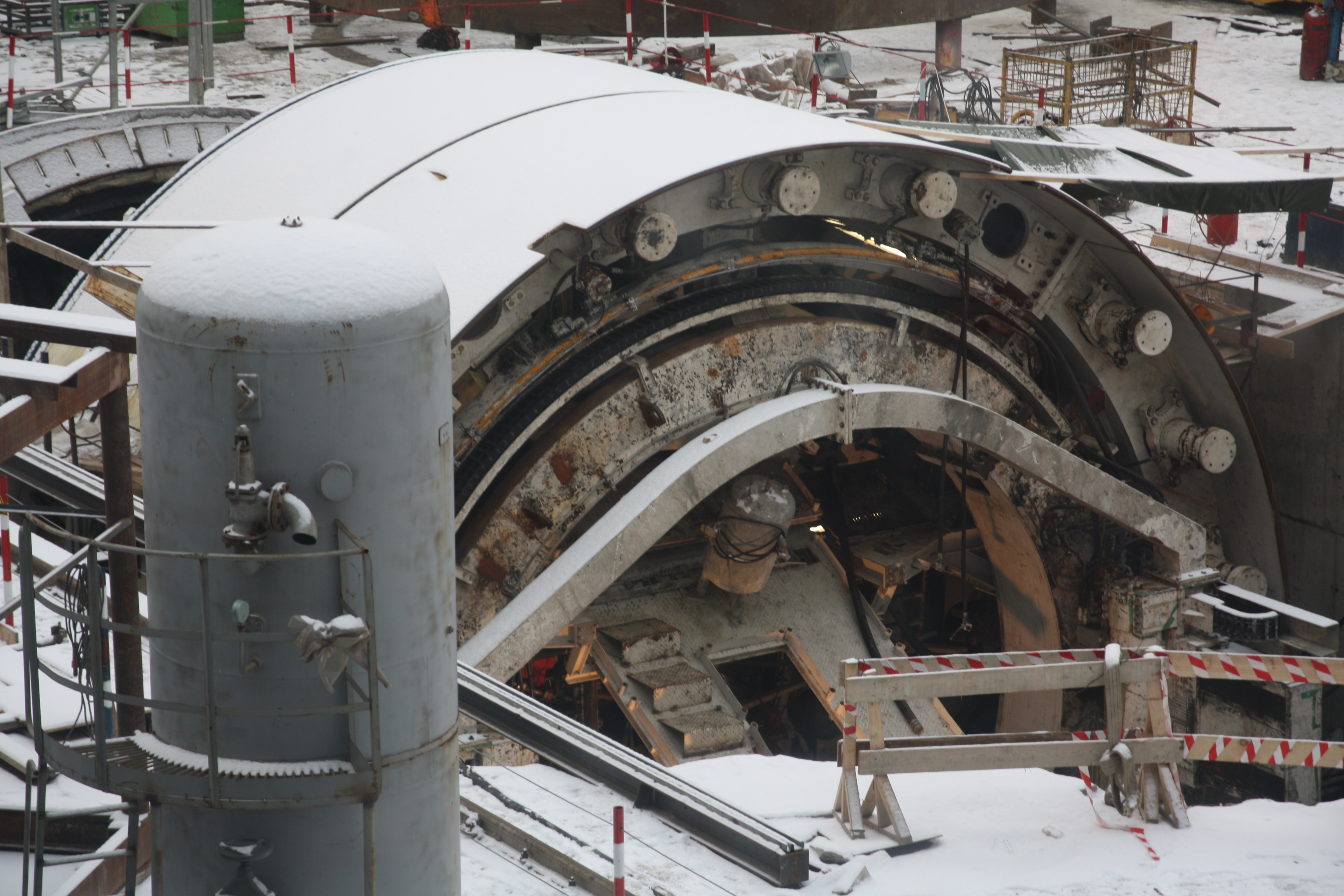 Строительство наклонного хода собственного выхода станции метро Спасская. Санкт-Петербург